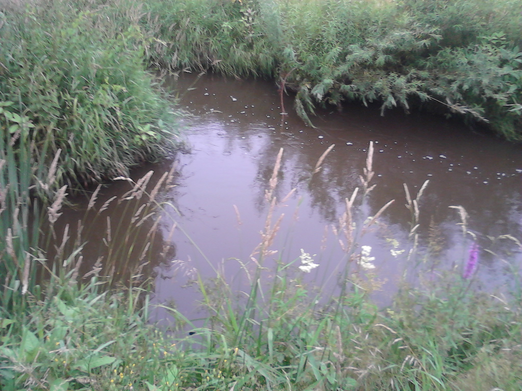 Die Mündung der Käbnitz in die Pulsnitz in Königsbrück